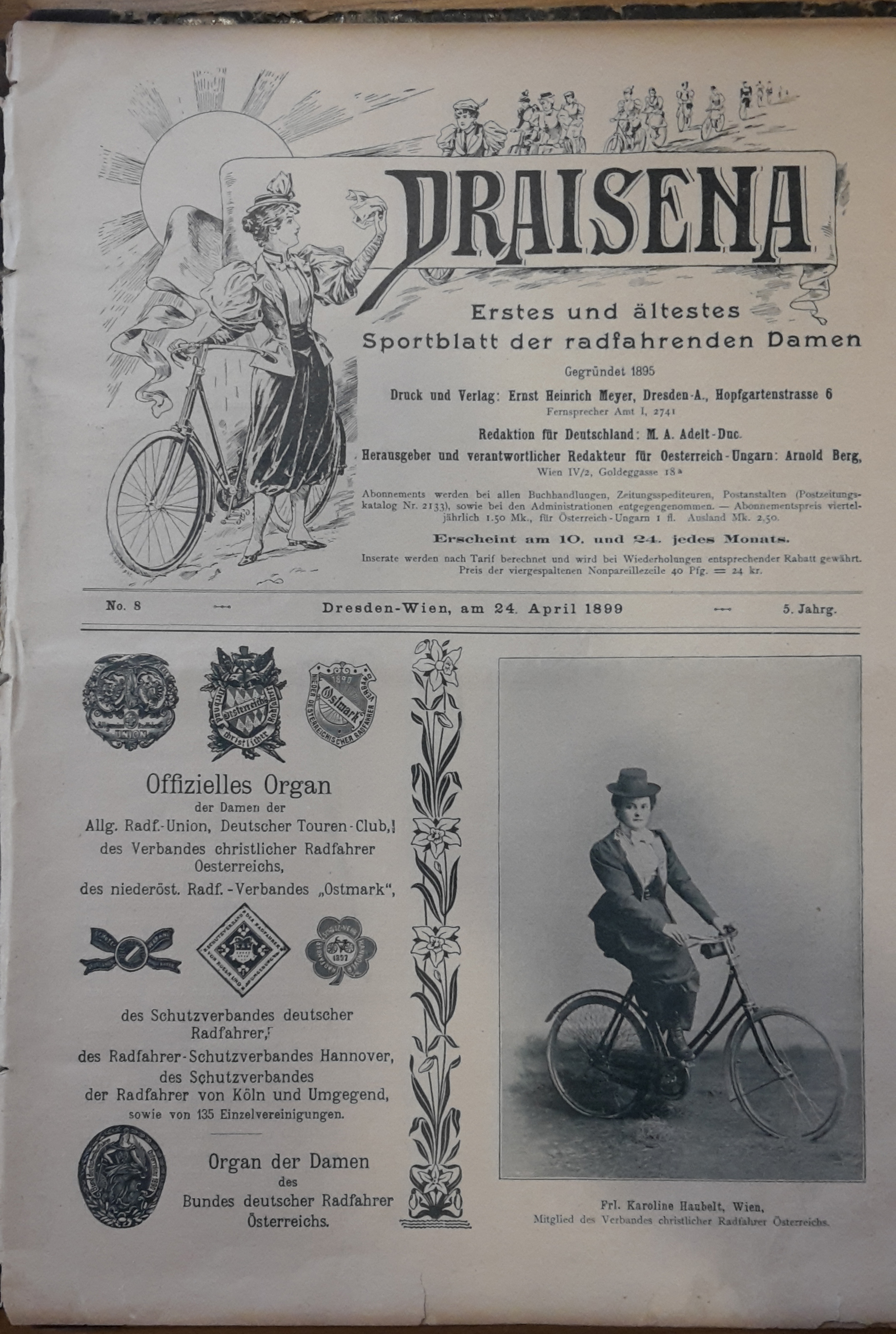 Draisena – Erstes und ältestes Sportblatt der radfahrenden Damen, Titelseite, Dresden-Wien am 24. April 1899, No. 8, 5. Jahrgang